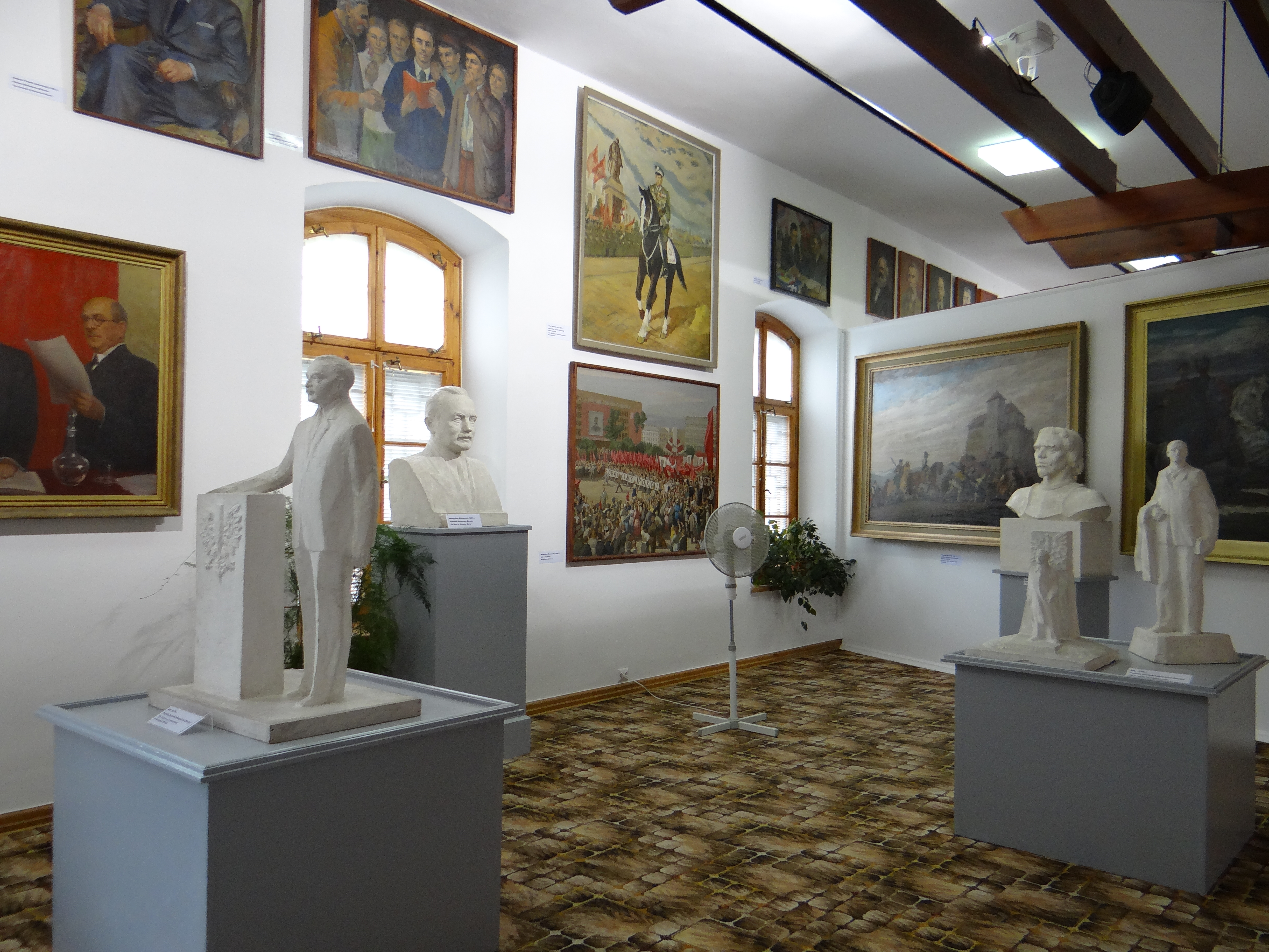 Galeria Socrealizmu w Kozłówce